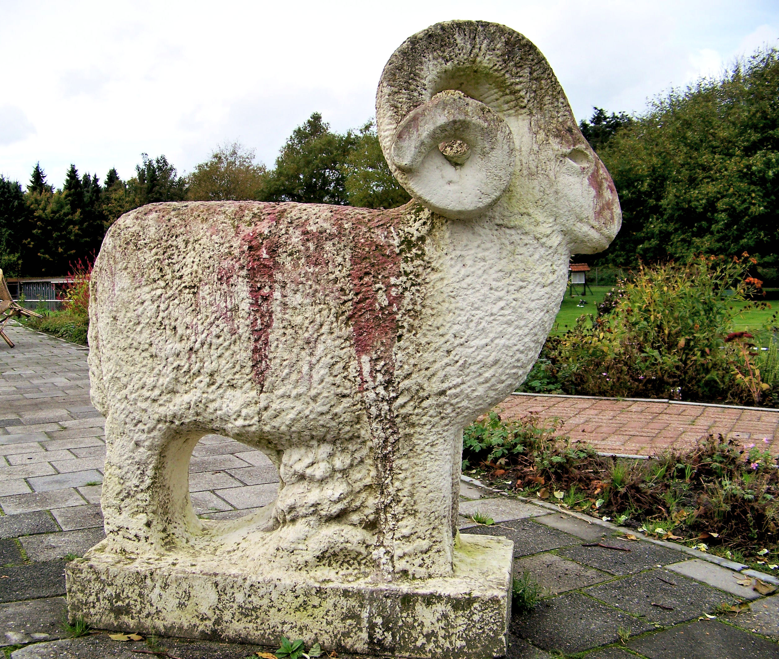 Heideschaap (1958) in Hoogezand, gemaakt door Willem Valk.